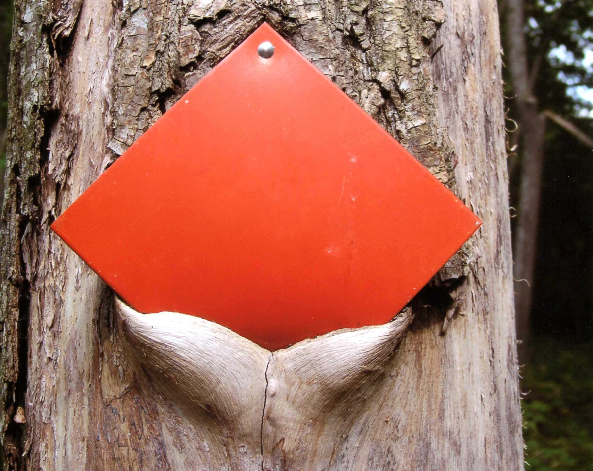 Vägmarkering vid sjön Aspen